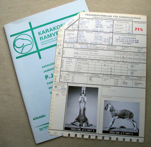 1) Karakoel-Ramveiling, Katalogus van die jaarlikse P. J. v. d. Westhuizen Karakoel en Dorper Ramveiling, Woensdag, 5 Junie 1985 te Karasburg (Skousaal), Namibia 72 swart, grys en wit Stamboek Karakoelramme; 20 gekeurde Dorperramme. Afslaers: Agra (Koöperatief) Bpk - Agra (Co-operative) Ltd - Agra Genossenschaft mbH